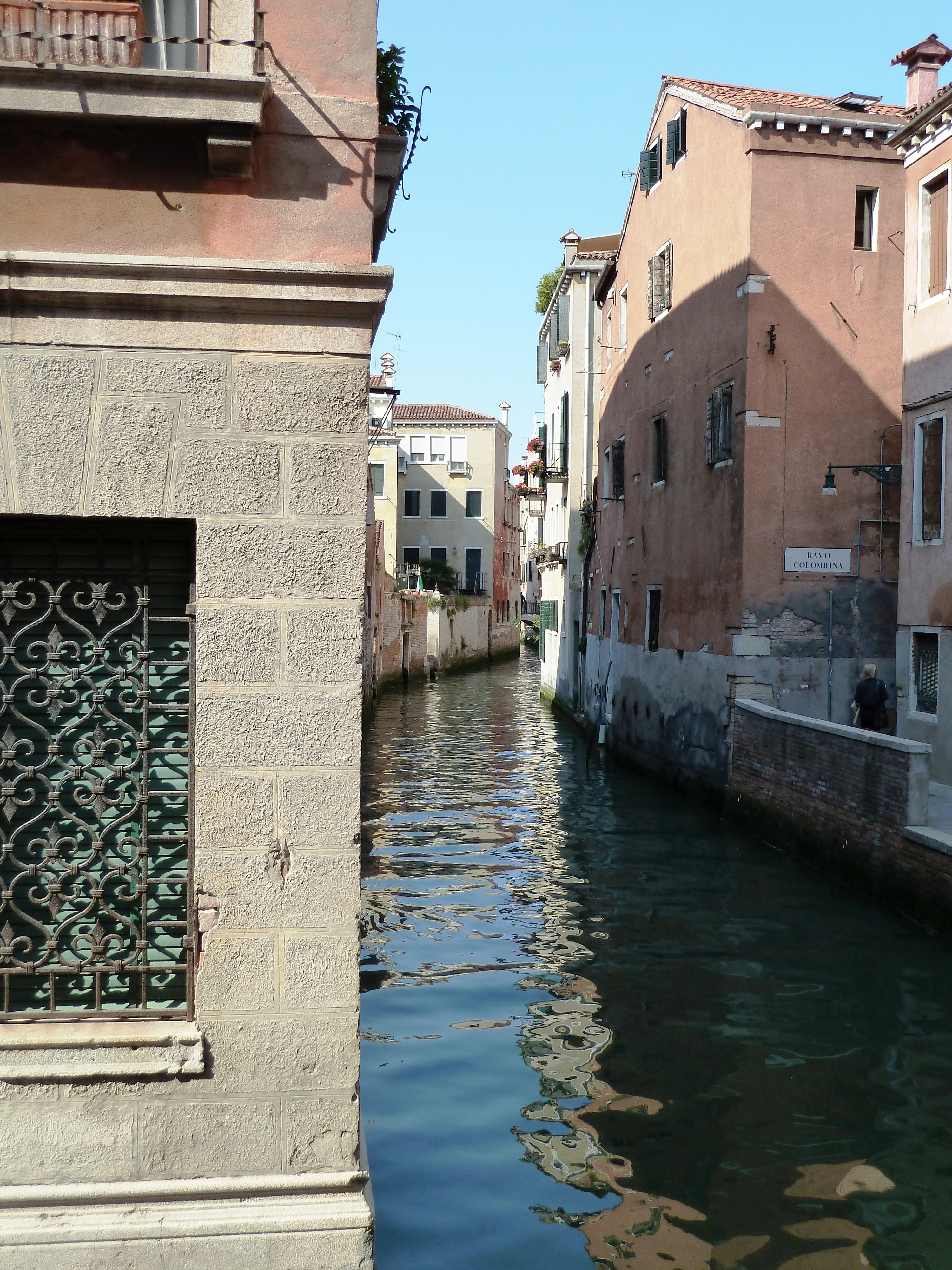 Rio di San Marcuola (Venice)